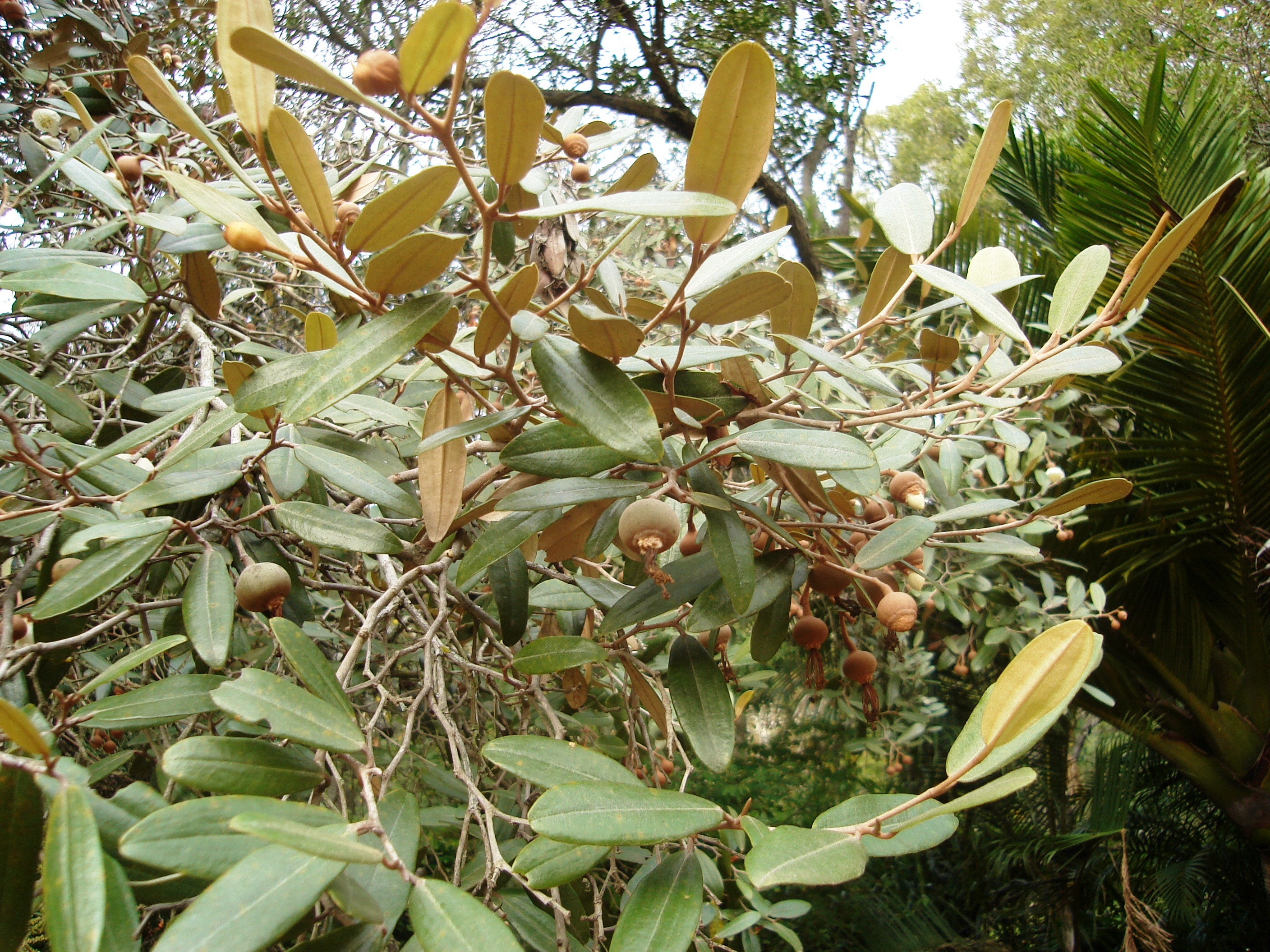 Sarcolaena oblongifolia (Detail) in the Tsimbazaza Botanical Garden, Antananarivo, Madagascar